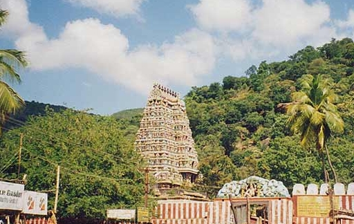 Azhagar kovil (temple),Madurai,Tamilnadu,India